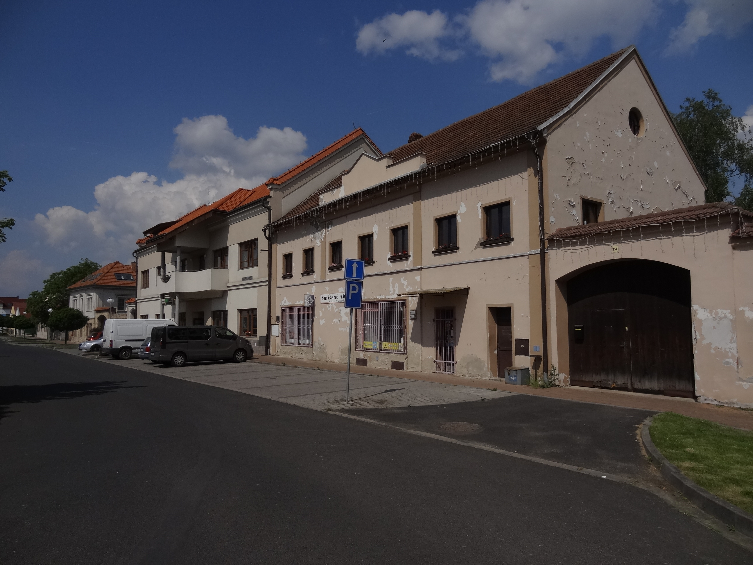 Dolní Beřkovice - náměstí Míru (v popředí čp. 24 a hostinec čp. 23)